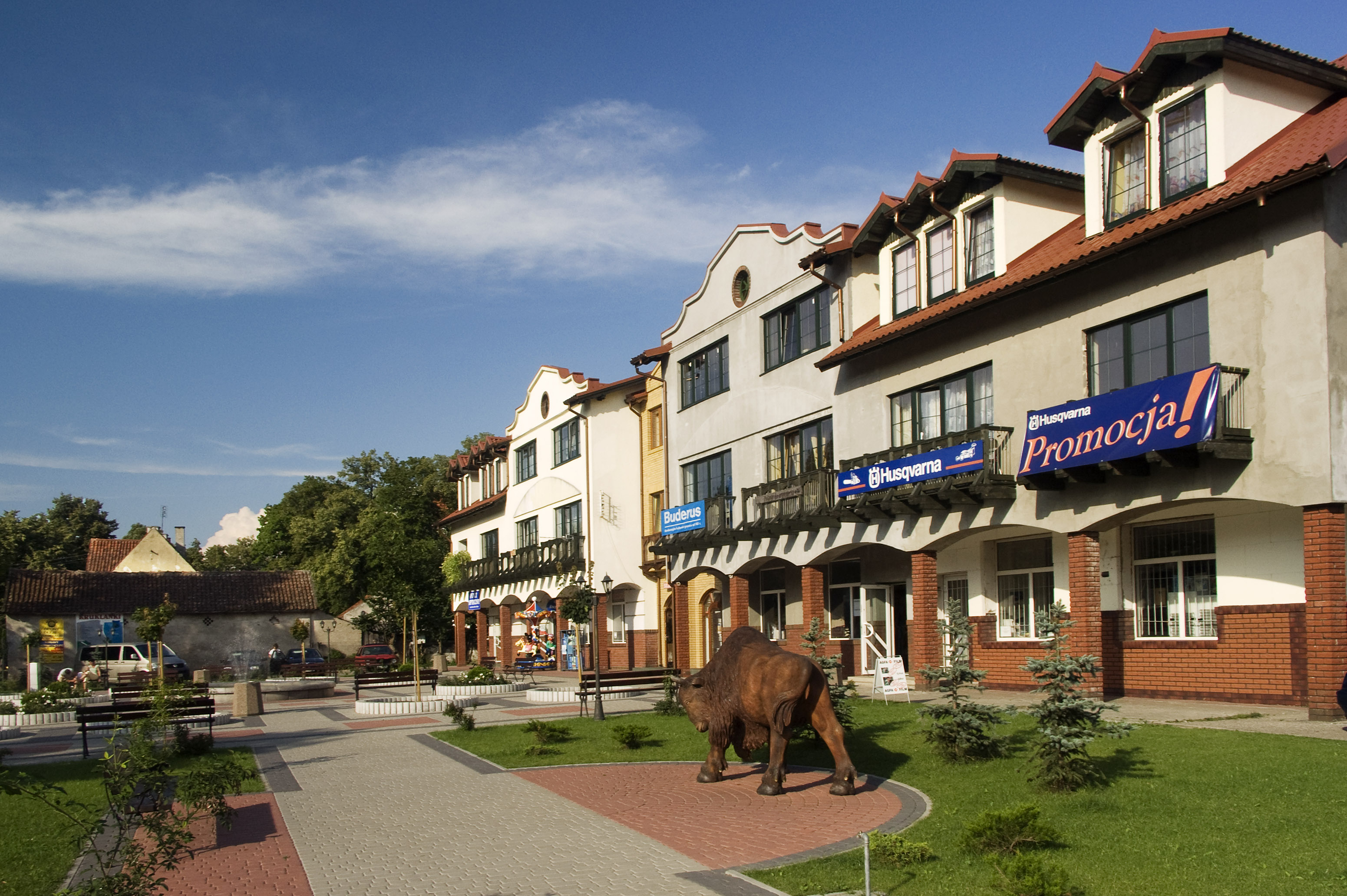 Centrum Kruklanek